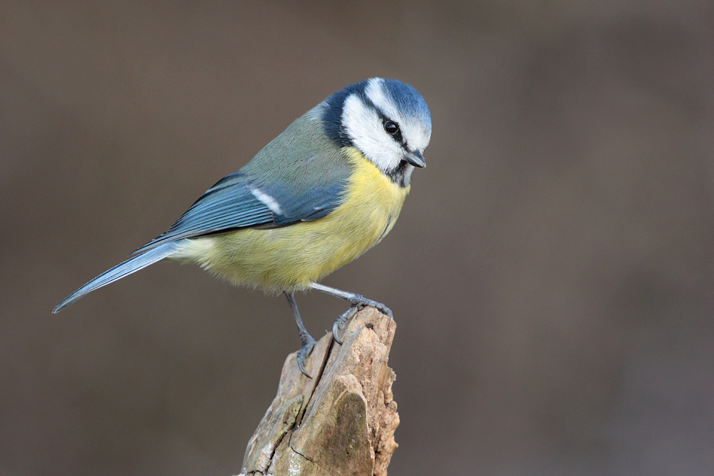 Blaumeise in der Nähe des Ilkerbruchs